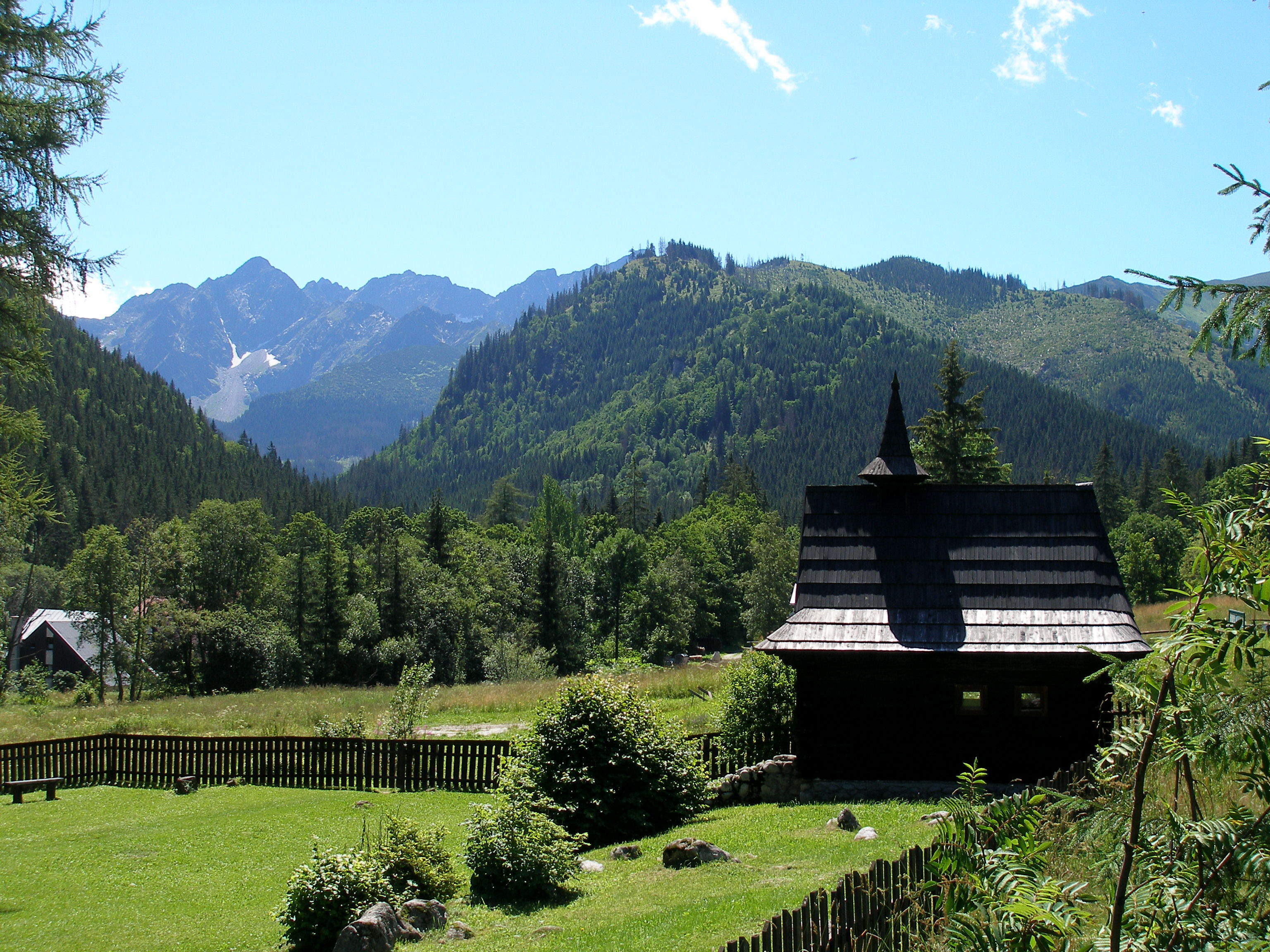 Drevená márnica na miestnom cintoríne. Podtatranská obec Tatranská Javorina.